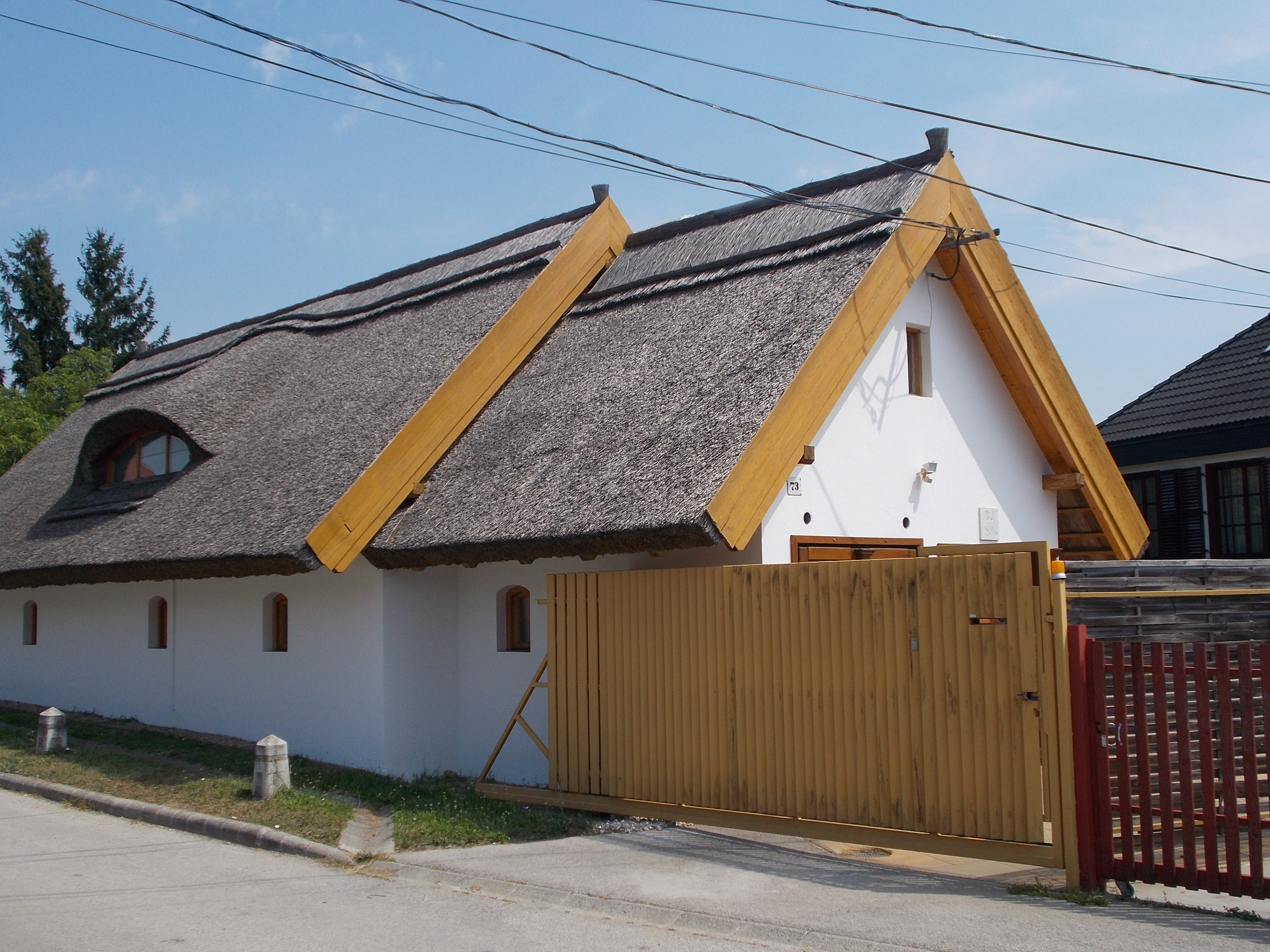 Egykori présház nádtetővel. Műemlék ID 732. Épült:1896-ban. - Magyarország, Fejér megye, Székesfehérvár, Öreghegy, Lomnici út 73. This is a photo of a monument in Hungary, Identifier: 732